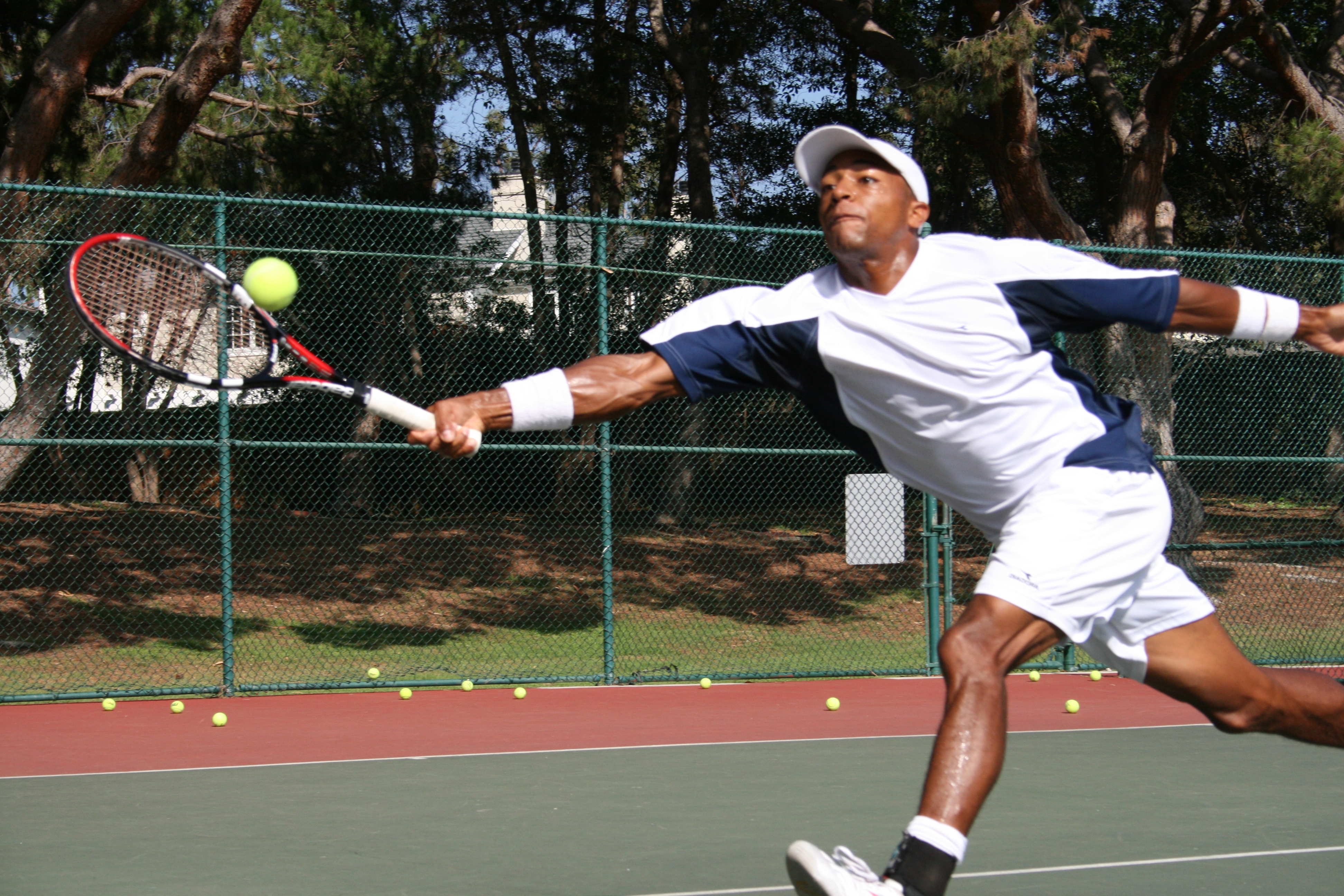 Si Nick Monroe, isang dalubhasang manlalaro ng tenis.